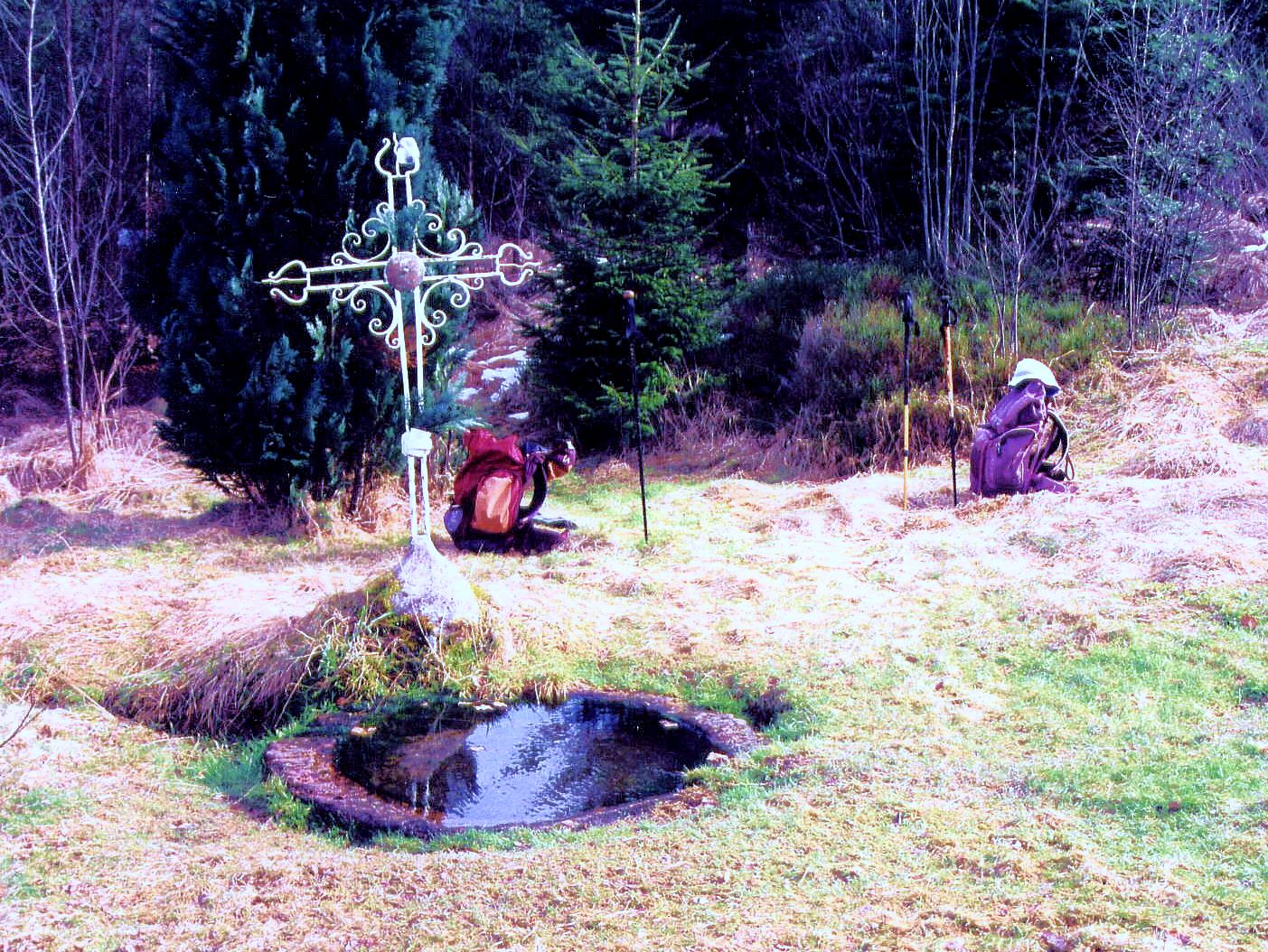 Saint-Etienne-lès-Remiremont. Source sainte Sabine et croix en fer forgé probablement installée au XIXe siècle